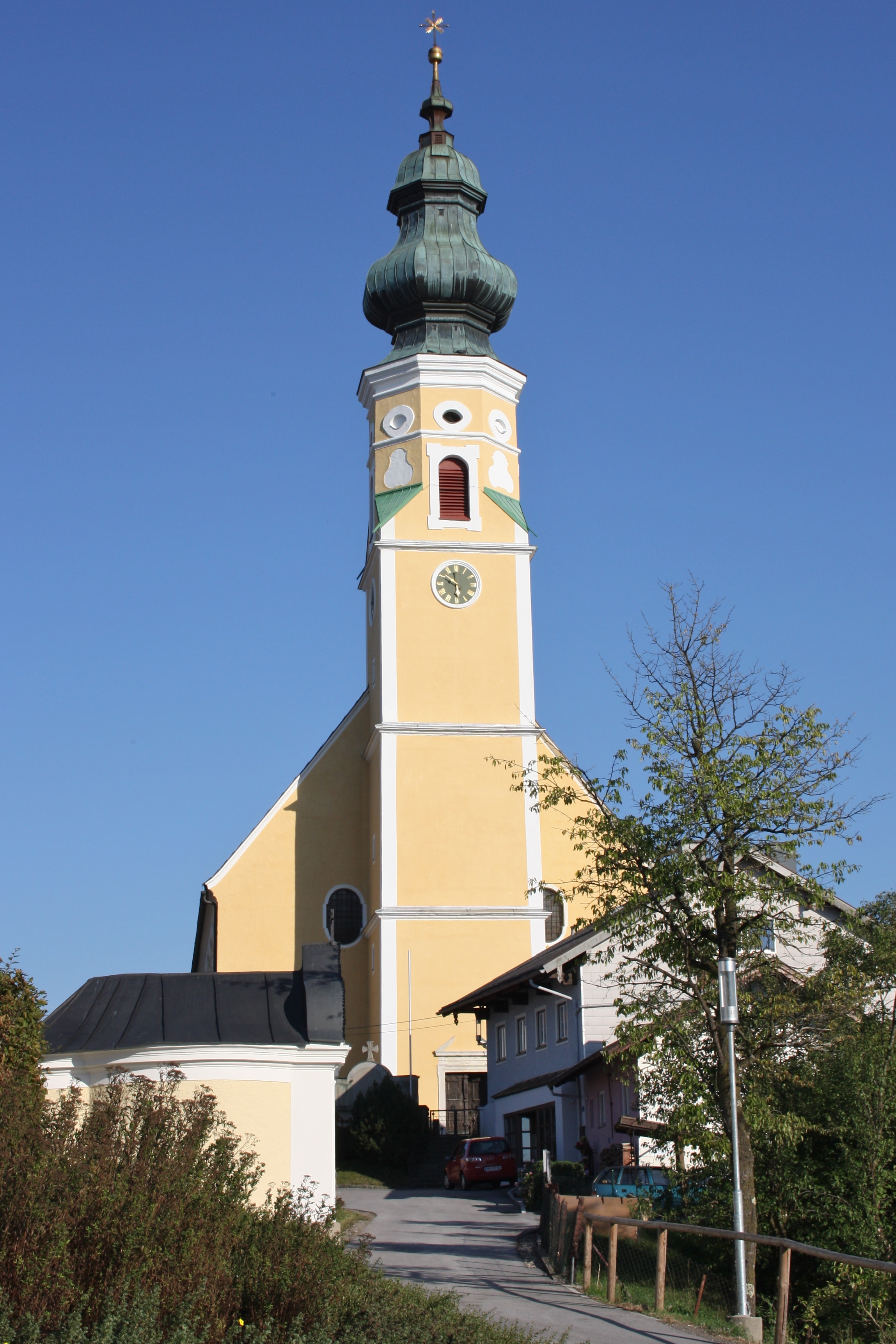 Kath. Pfarrkirche Mariä Himmelfahrt und Friedhof